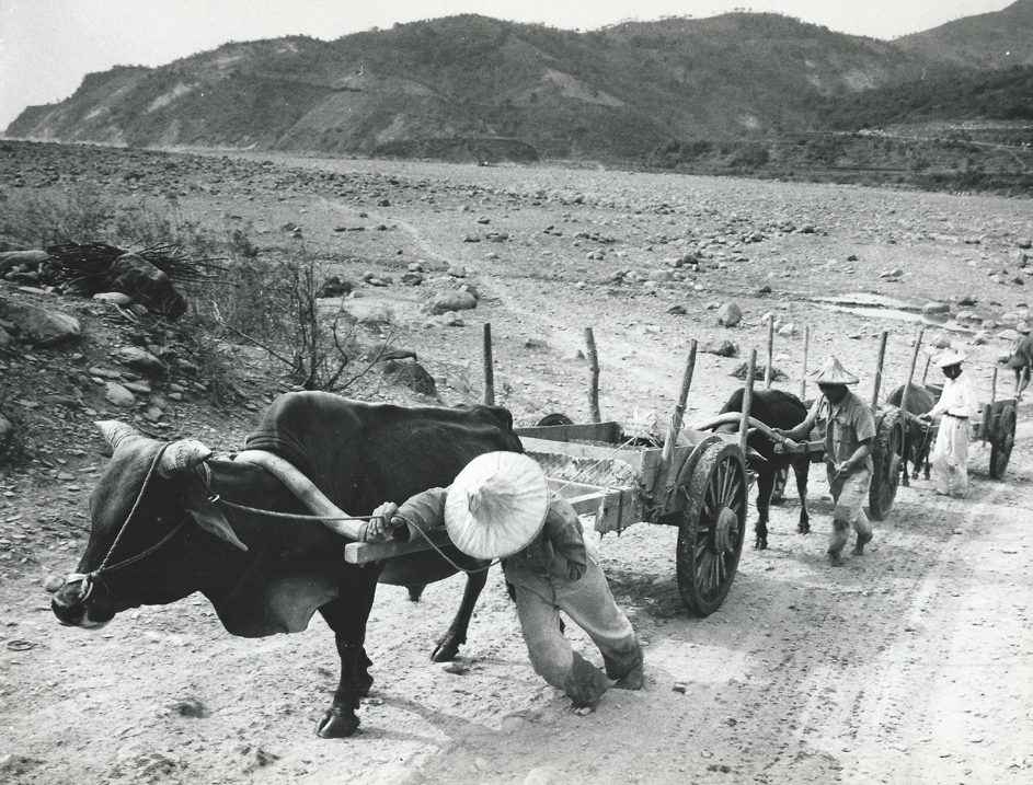 Titelfoto zur Ausstellung "World Press Photo '62", Den Haag vom 28.11.1962 bis 20.01.1963